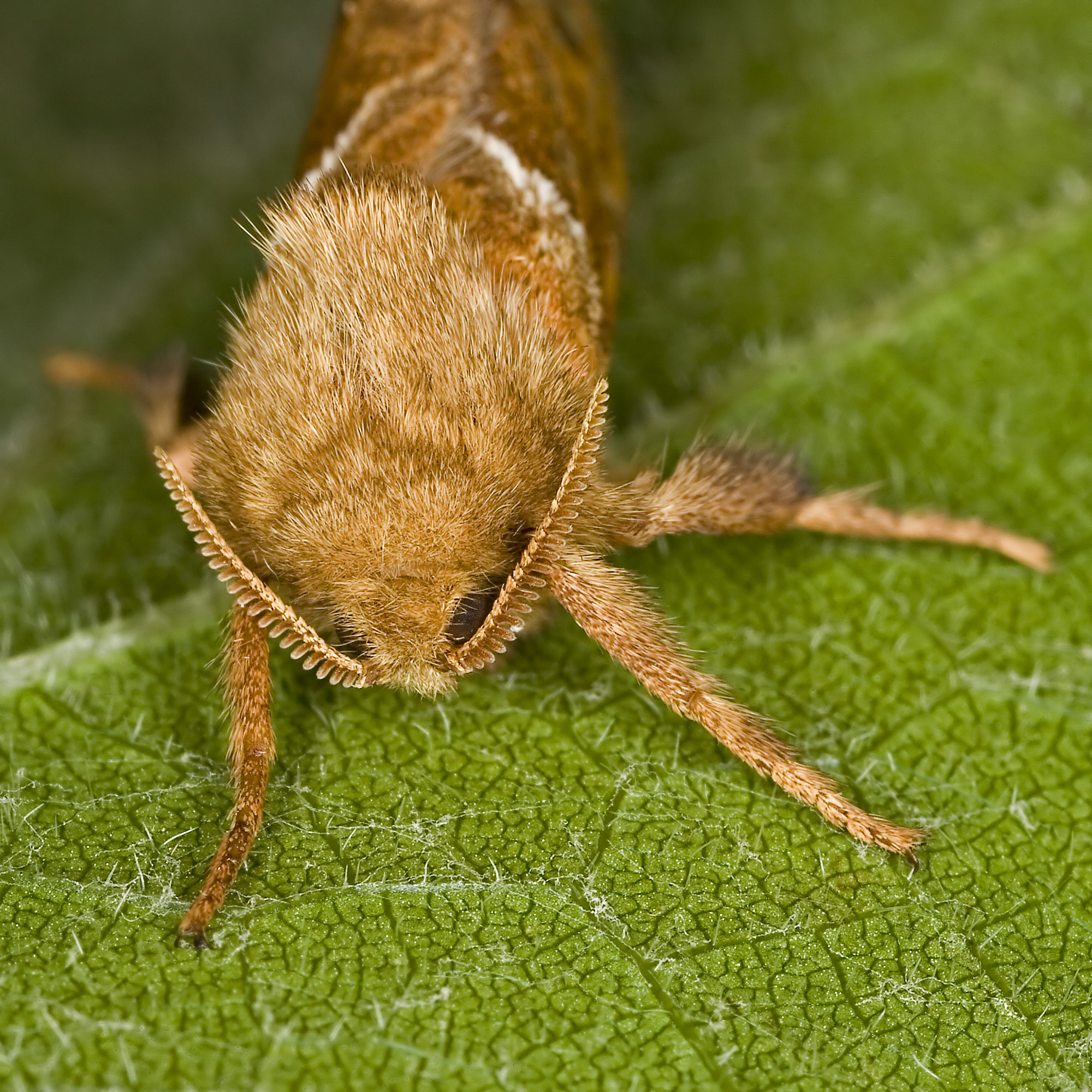 Triodia sylvina head detail